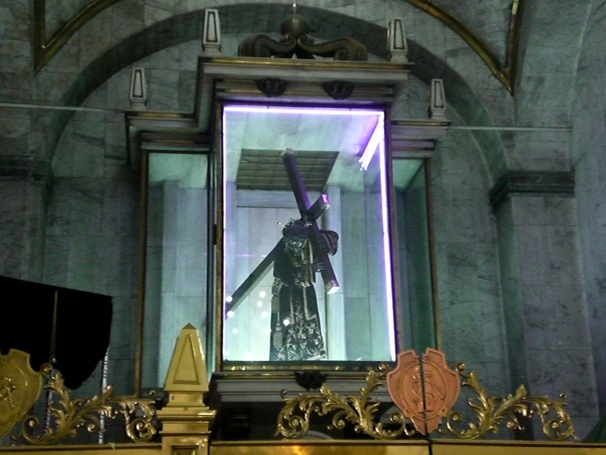 Nazareno de San Pablo, Caracas, Venezuela.